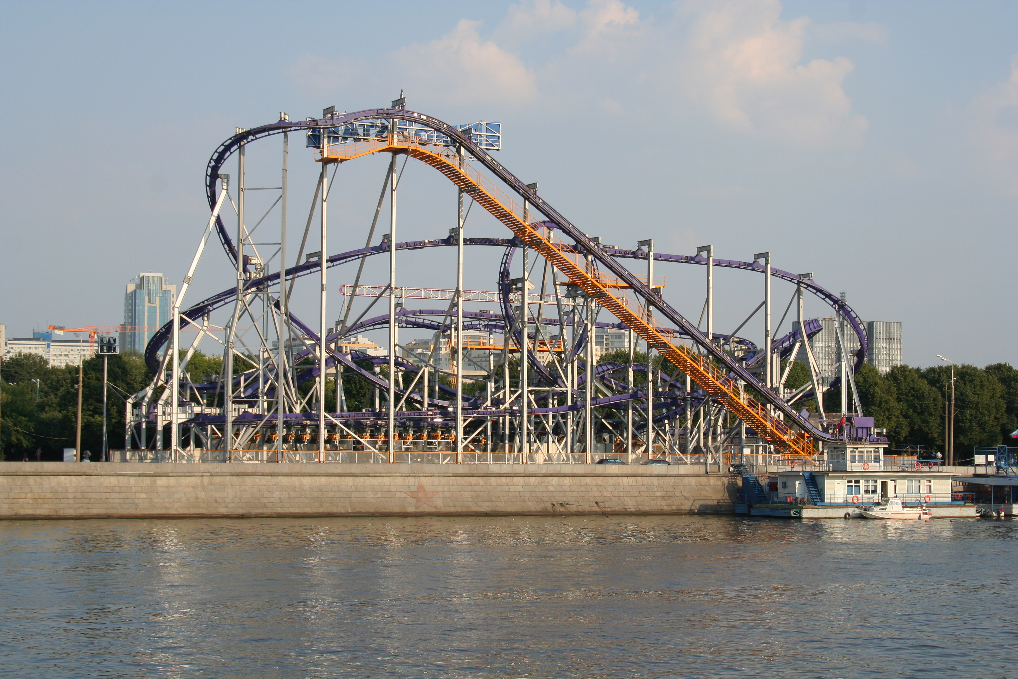 Der Gorki-Park in Moskau. Blick auf den Park von der Frunsenskaja-Uferstraße am gegenüberliegenden Ufer der Moskwa.